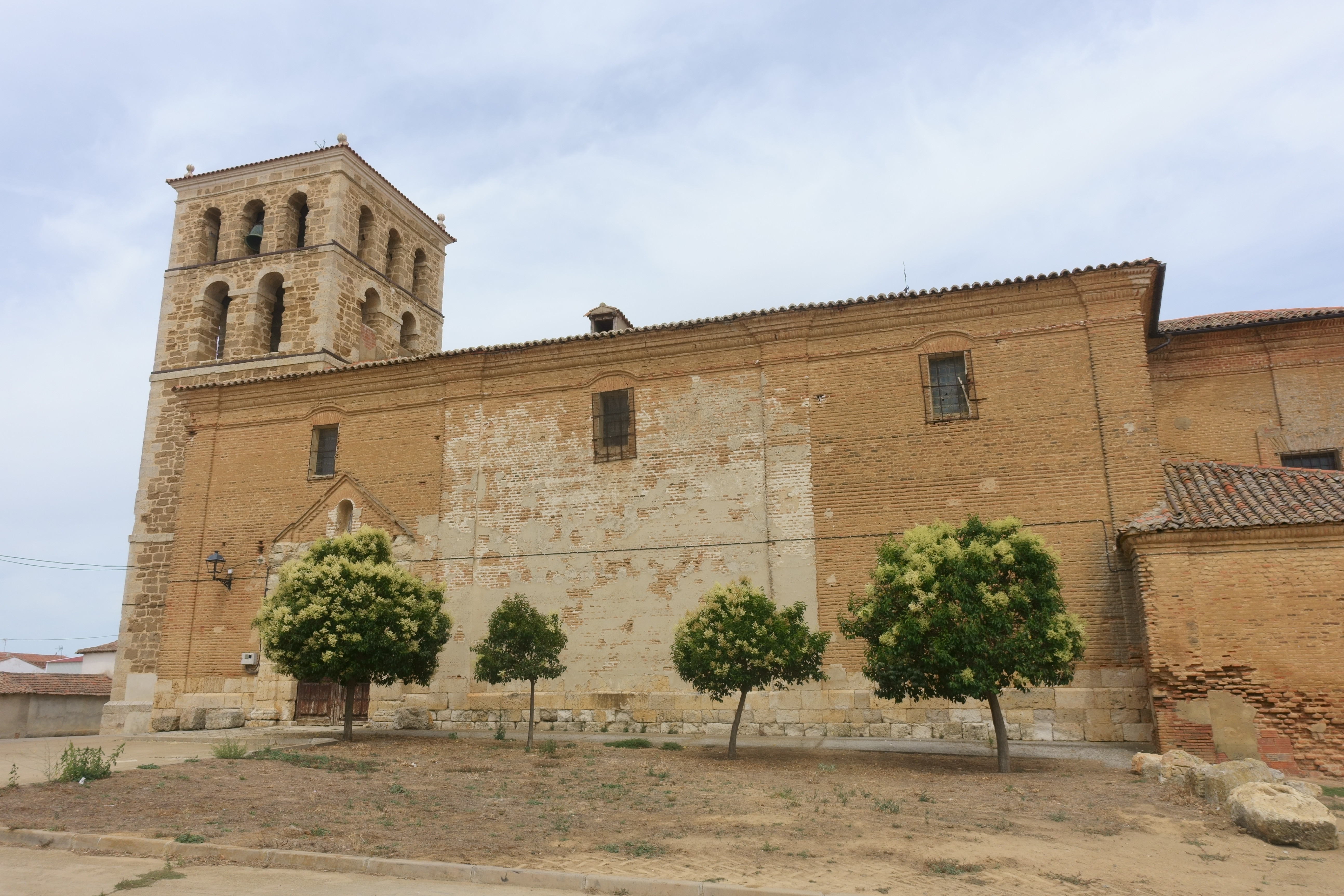 Iglesia de San Miguel, Villalumbroso (Palencia, España).